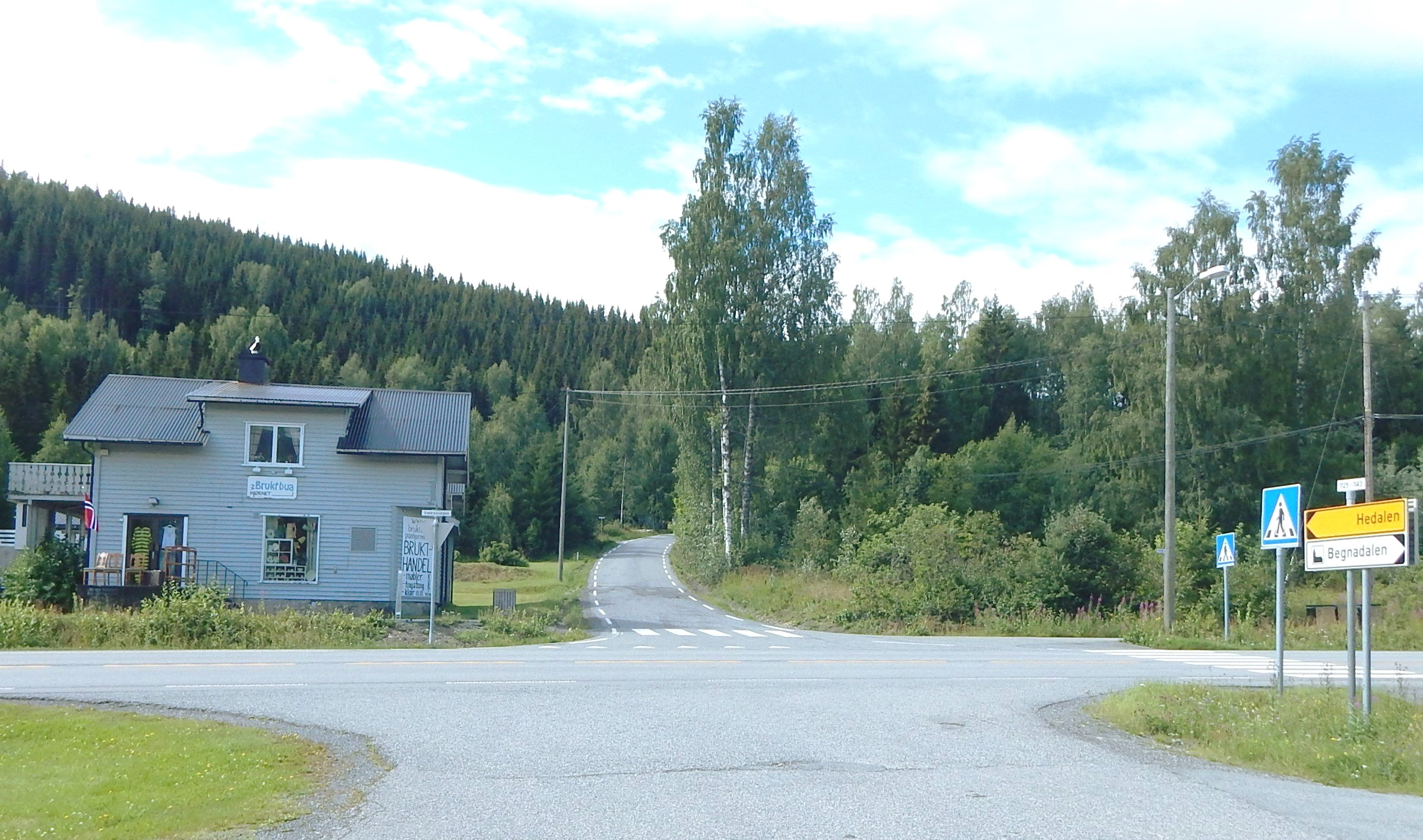 Fylkesvei 2456 (tidl. 225) tar av fra E16 ved Tollefsrud